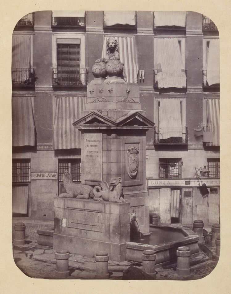 Fuente de la calle de Toledo esquina a la Arganzuela. Obra en 1864 del fotógrafo toledano Alfonso Begué, muerto el 31 de octubre de 1865. Cartulina sepia. Albúmina. 43 x 32 cm. Fotografía contenida en un álbum procedente del Archivo de Villa y trasladado al Museo de Historia en 1983.